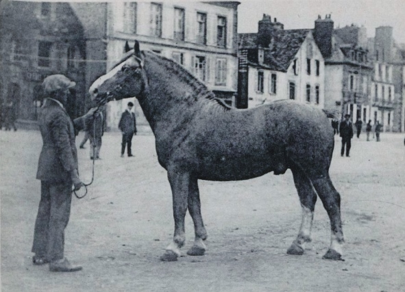 Photographie d'un cheval "trait postier breton" âgé de 3 ans, dénommé Turenne, appartenant à F.-C. Guéguen, de Plougourvest, ayant obtenu le premier prix au concours central de Paris en 1926 et vendu aux Haras français.